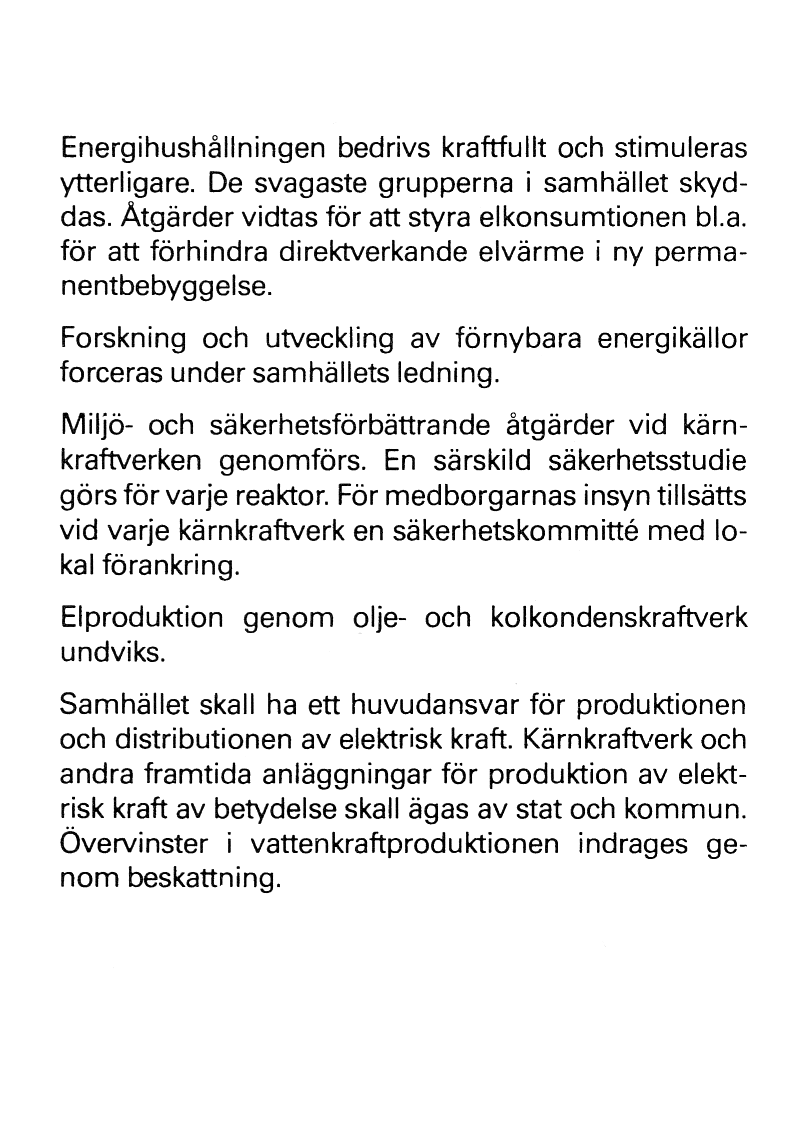 Baksida på valsedel för linje2